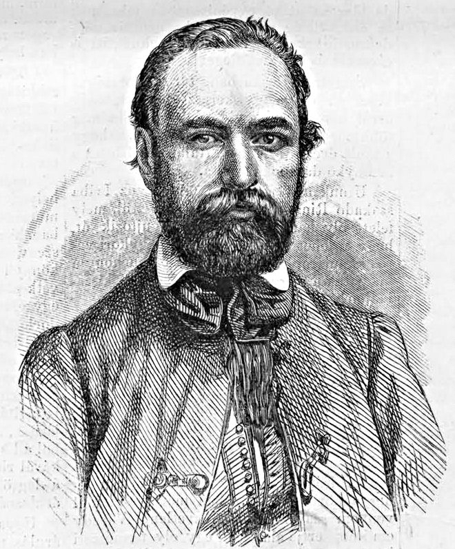 Molnár József (1821–1899) festőművész arcképe (Vasárnapi Ujság, 1864. március 13.)